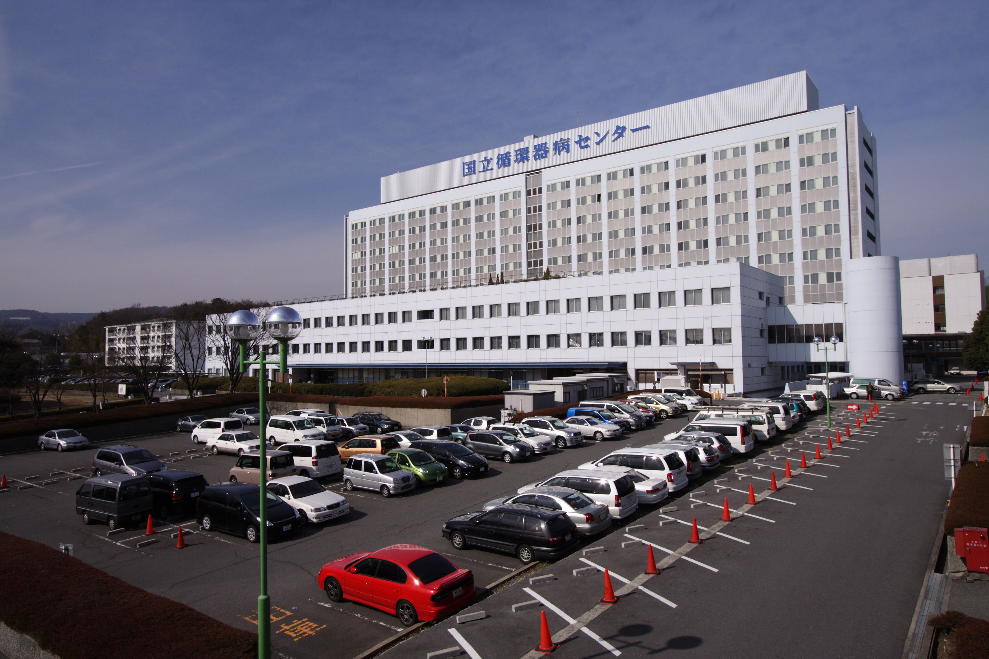 国立循環器病センター・大阪府/National Cardiovascular Center Osaka, Japan